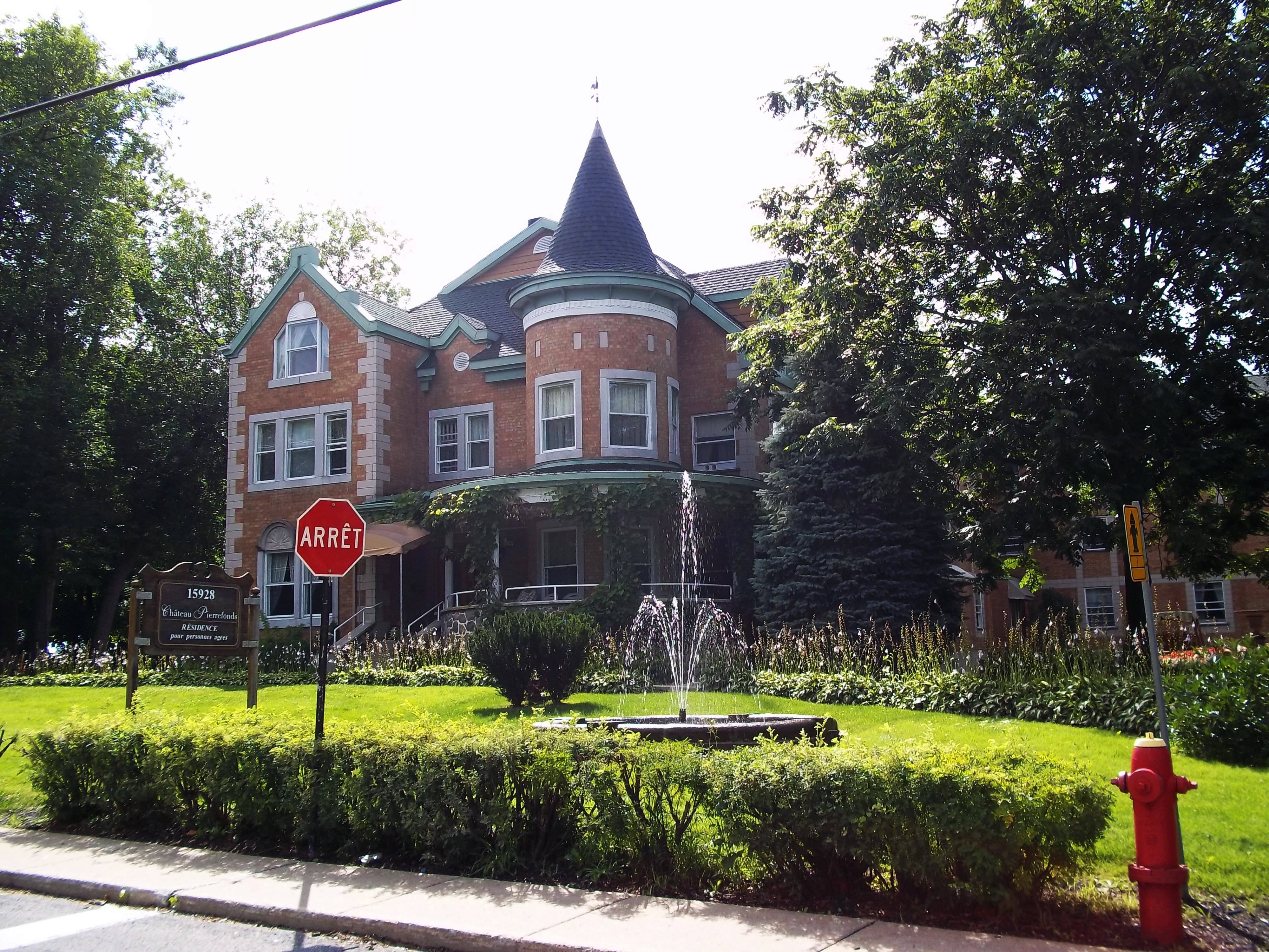 Maison Joseph-Adolphe Chauret ou Château Pierrefonds, 15928, boulevard Gouin Ouest, Montréal. info, détails